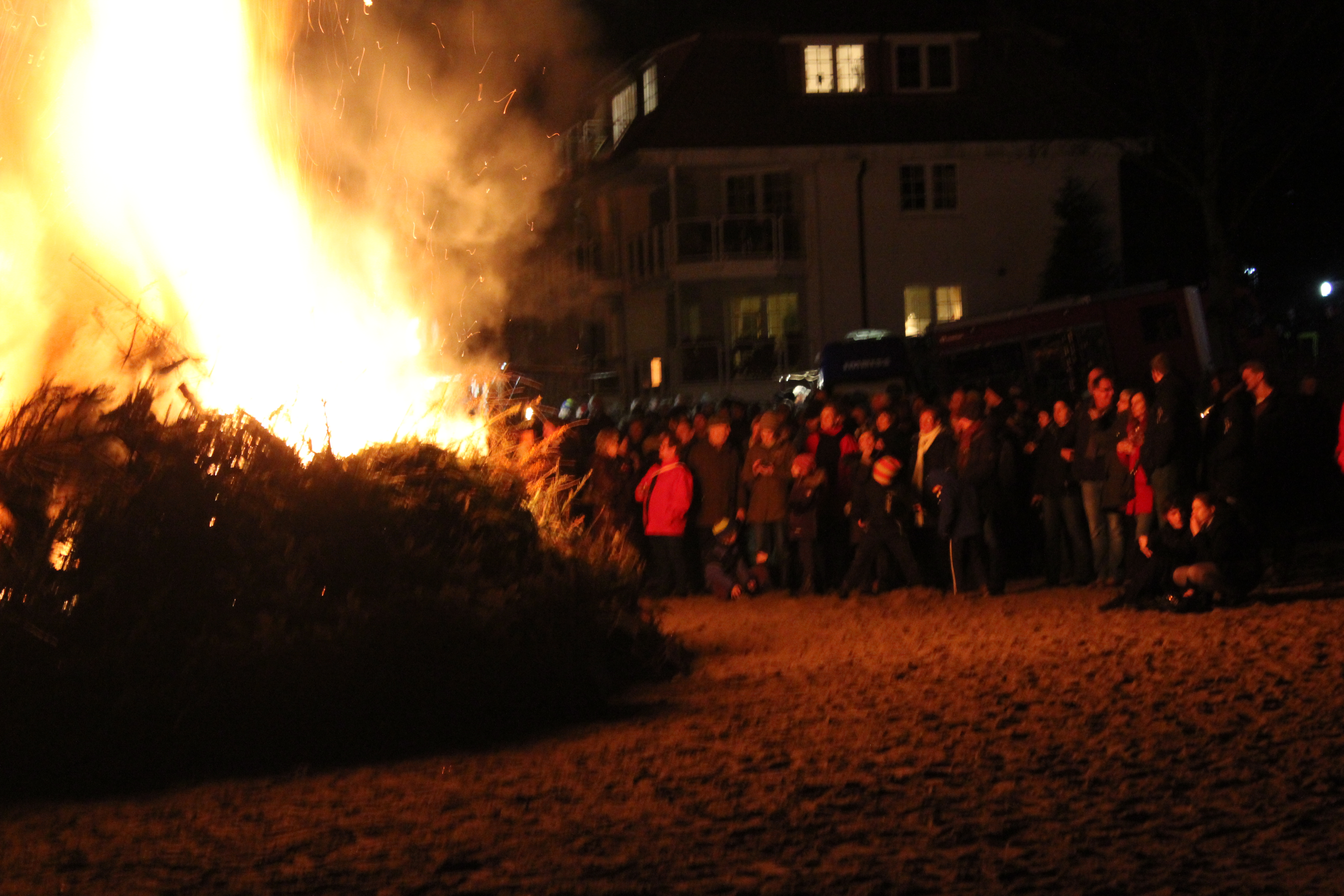 Biikebrennen in Wassersleben (2014), nach der Entzündung